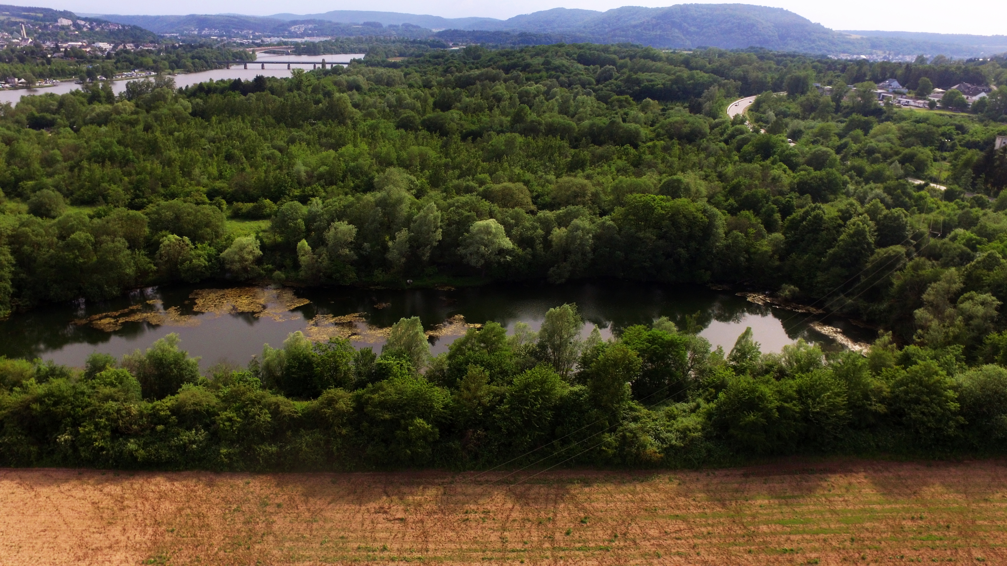 Trier-Zewenː Naturschutzgebiet Kiesgrube bei Oberkirch - links oben im Hintergrund die Mosel mit der Konzer Eisenbahnbrücke